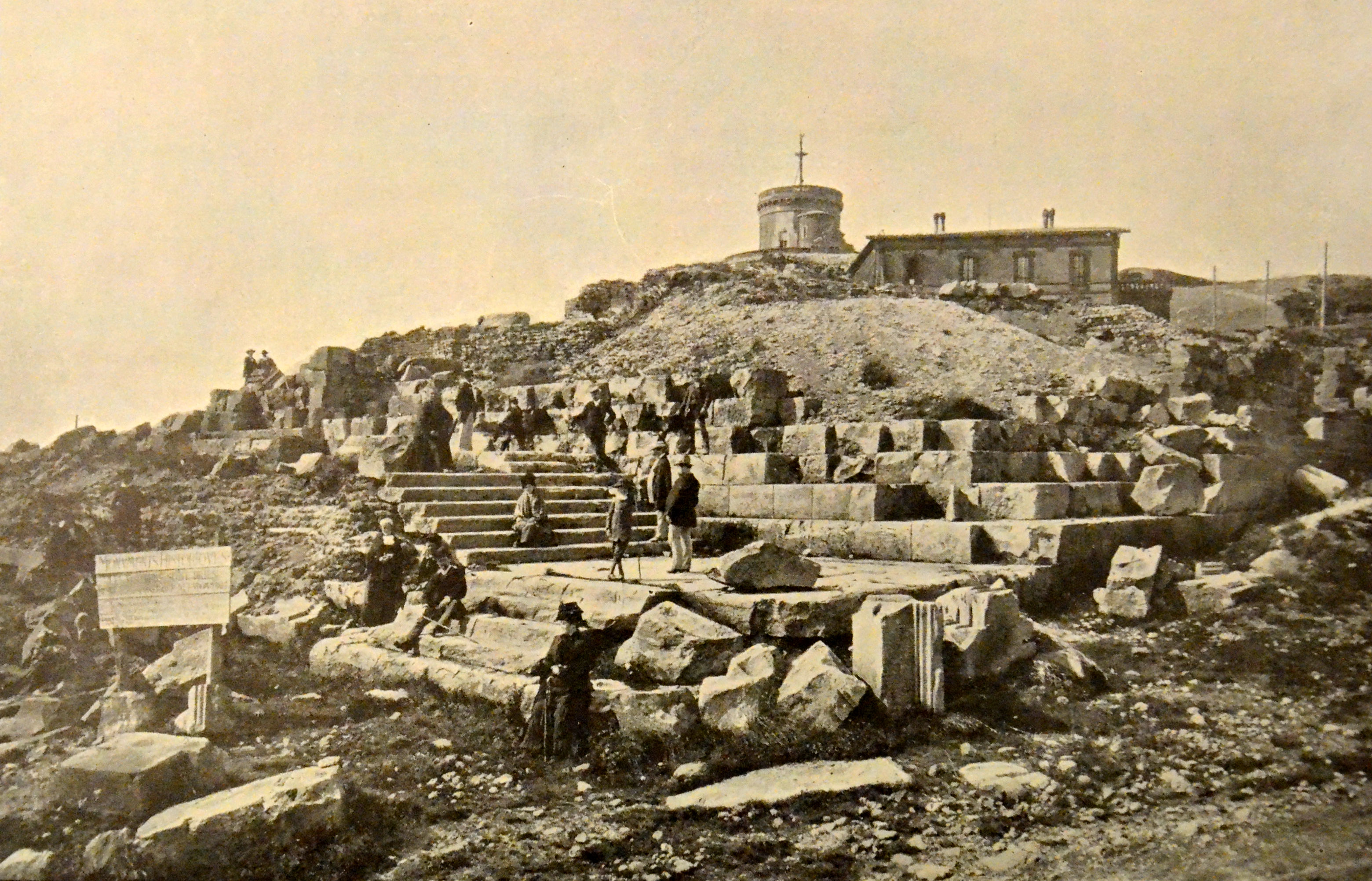 Photo légendée "Le Temple de Mercure, et l'Observatoire du Puy-de-Dôme", dans un article de la "Revue illustrée" (Tome relié 1902) intitulée "Sensations d'Auvergne"